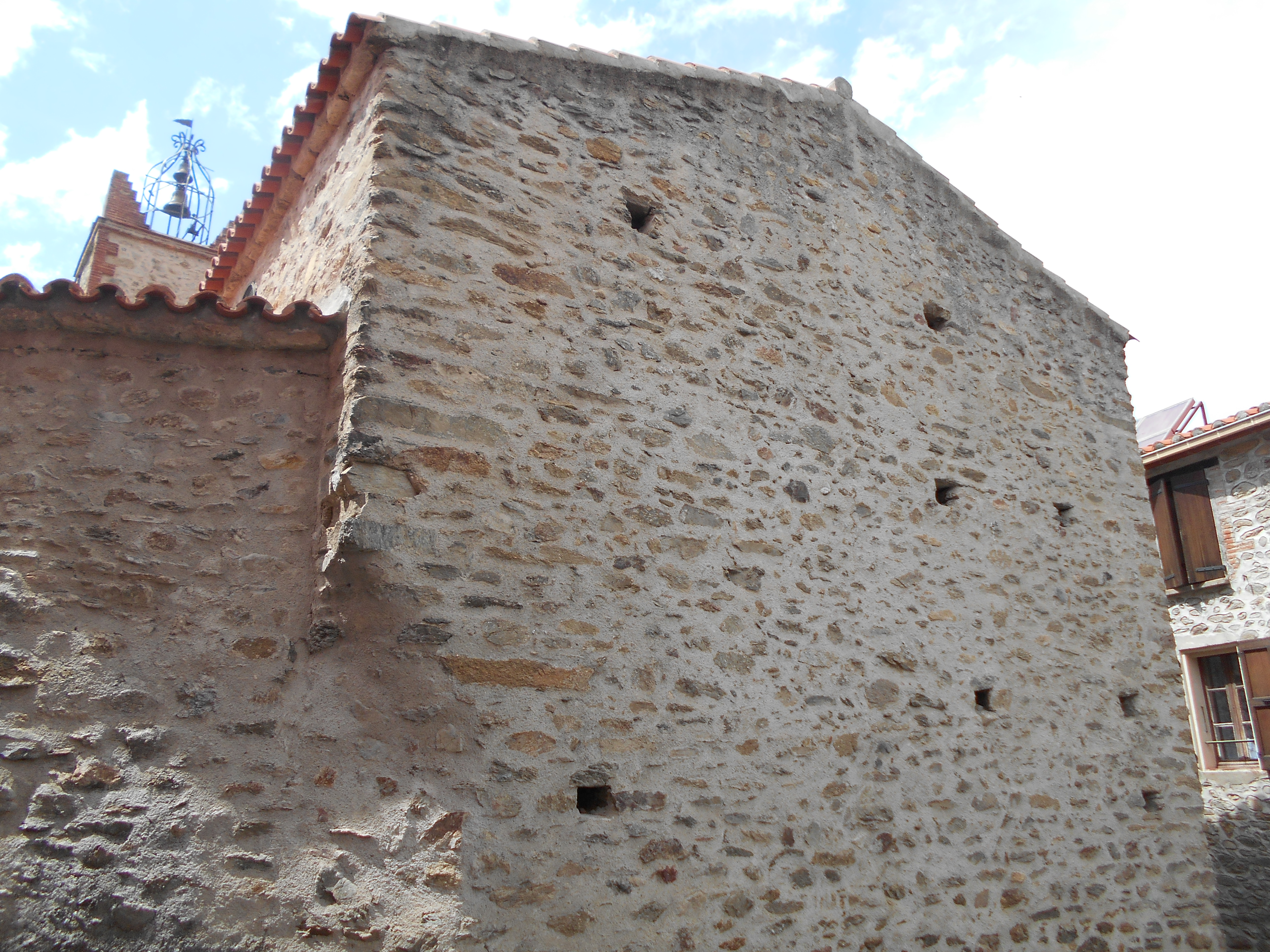 Sant Marrtí de Clarà (Clarà i Villerac)